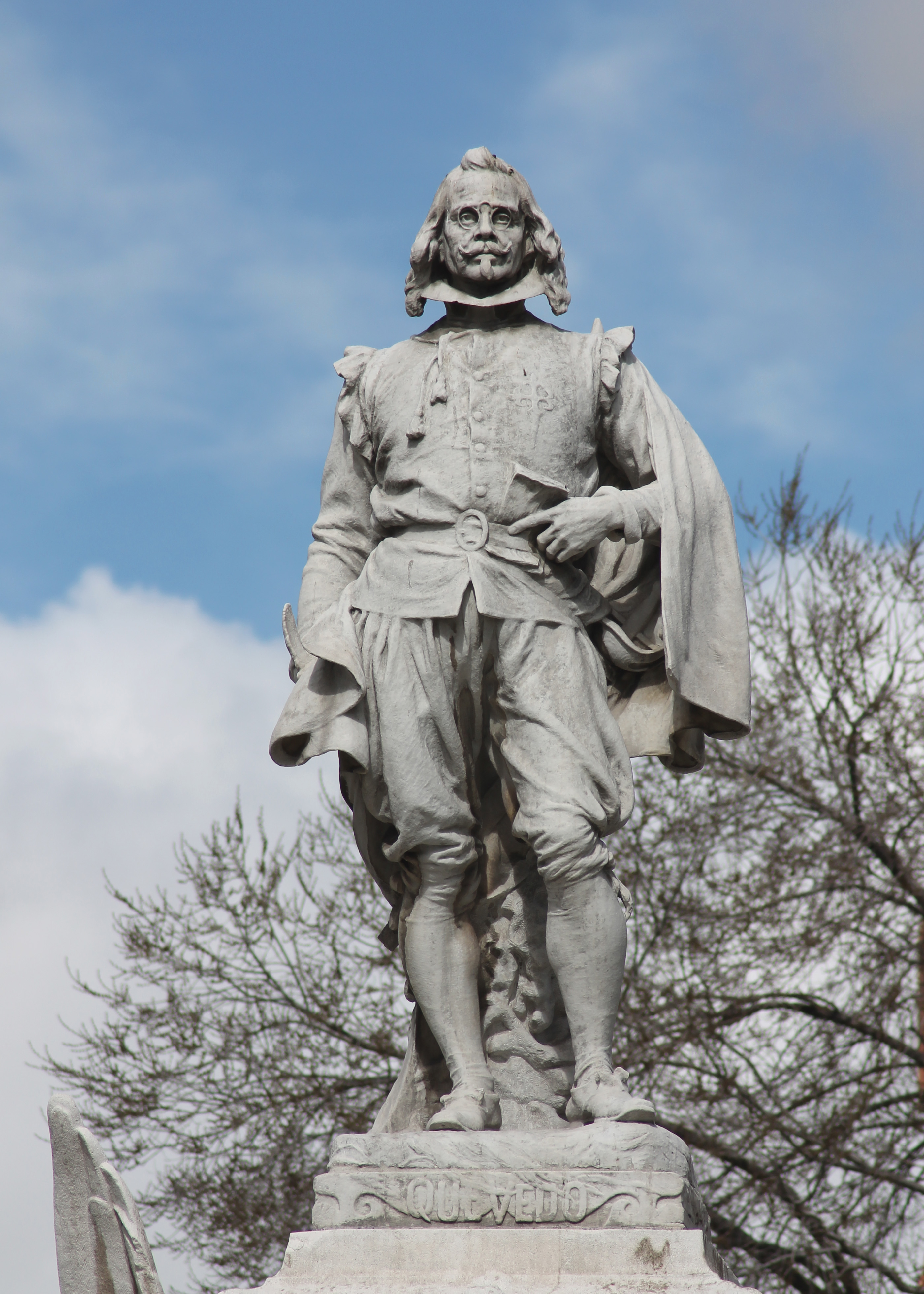 Depicted person: Francisco de Quevedo